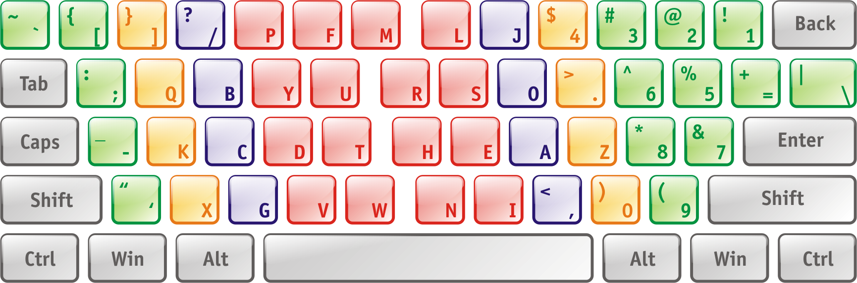 Dvorak Layout for left hand